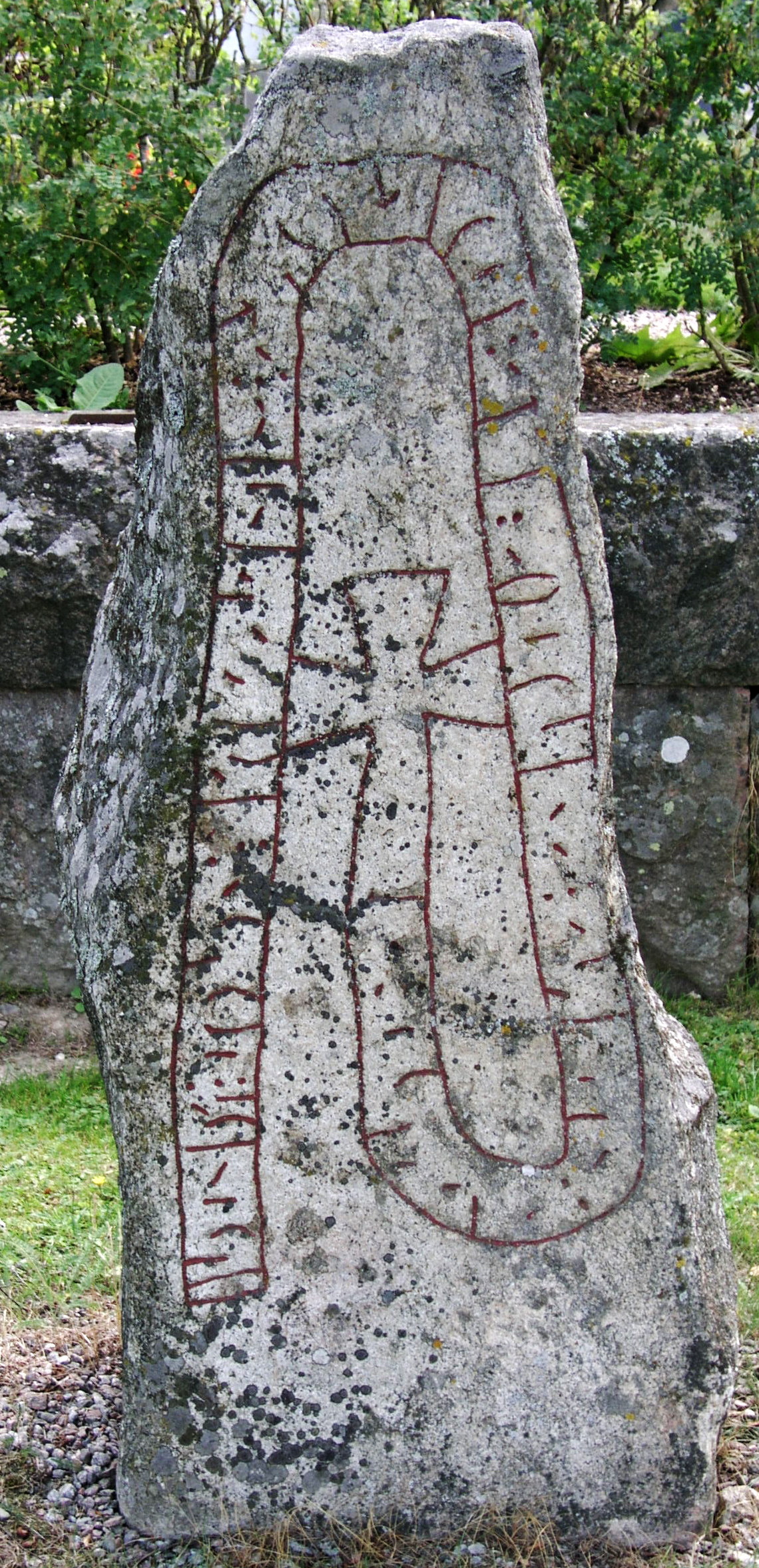 Högs kyrka, Hudiksvall. Rune stone Hs 12.